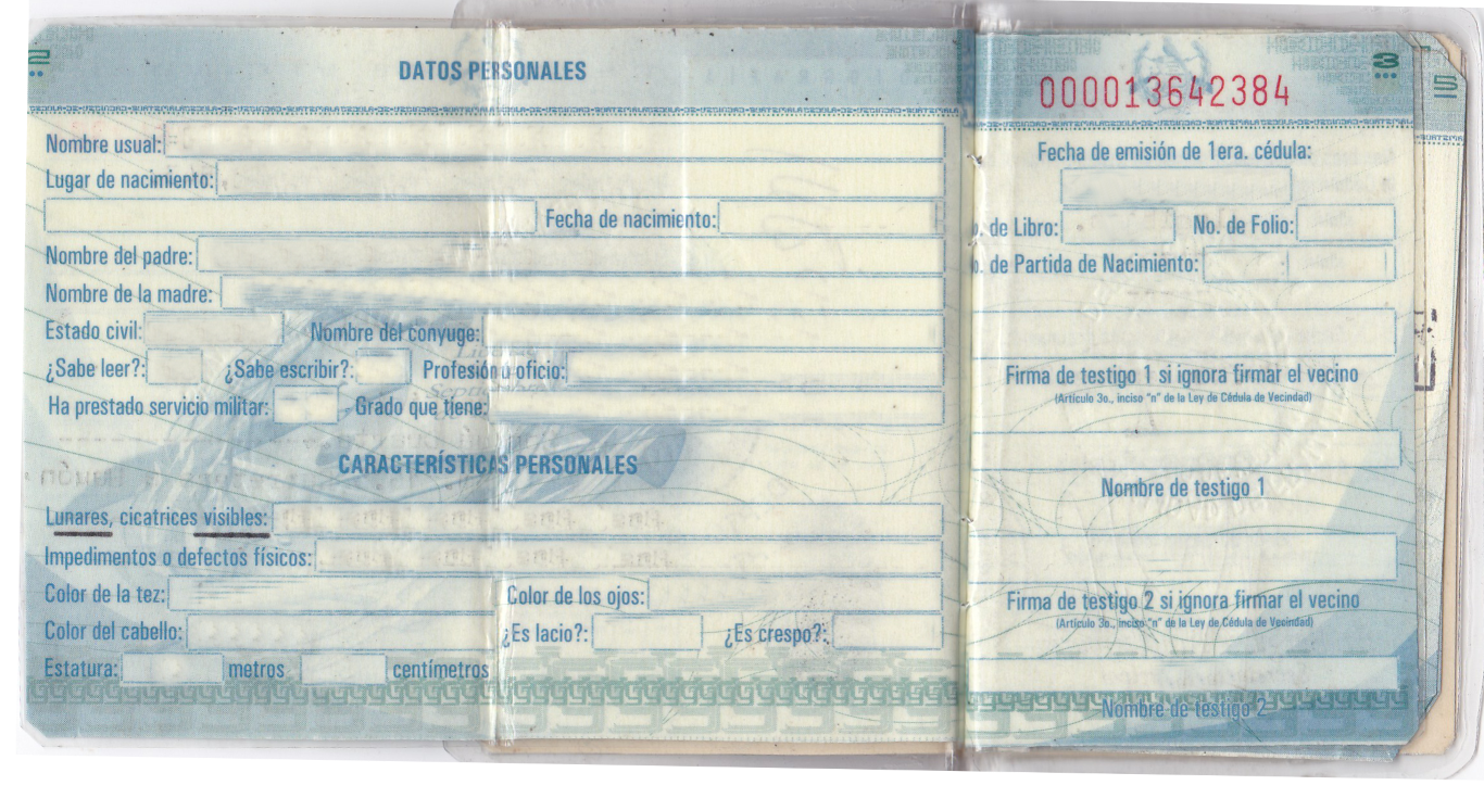 Cedula escaneada formato